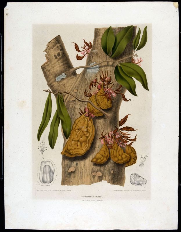 Litho. Het blad, de bloemen en de vruchten van de Cynometra cauliflora L. Unknown language: Katak Puru